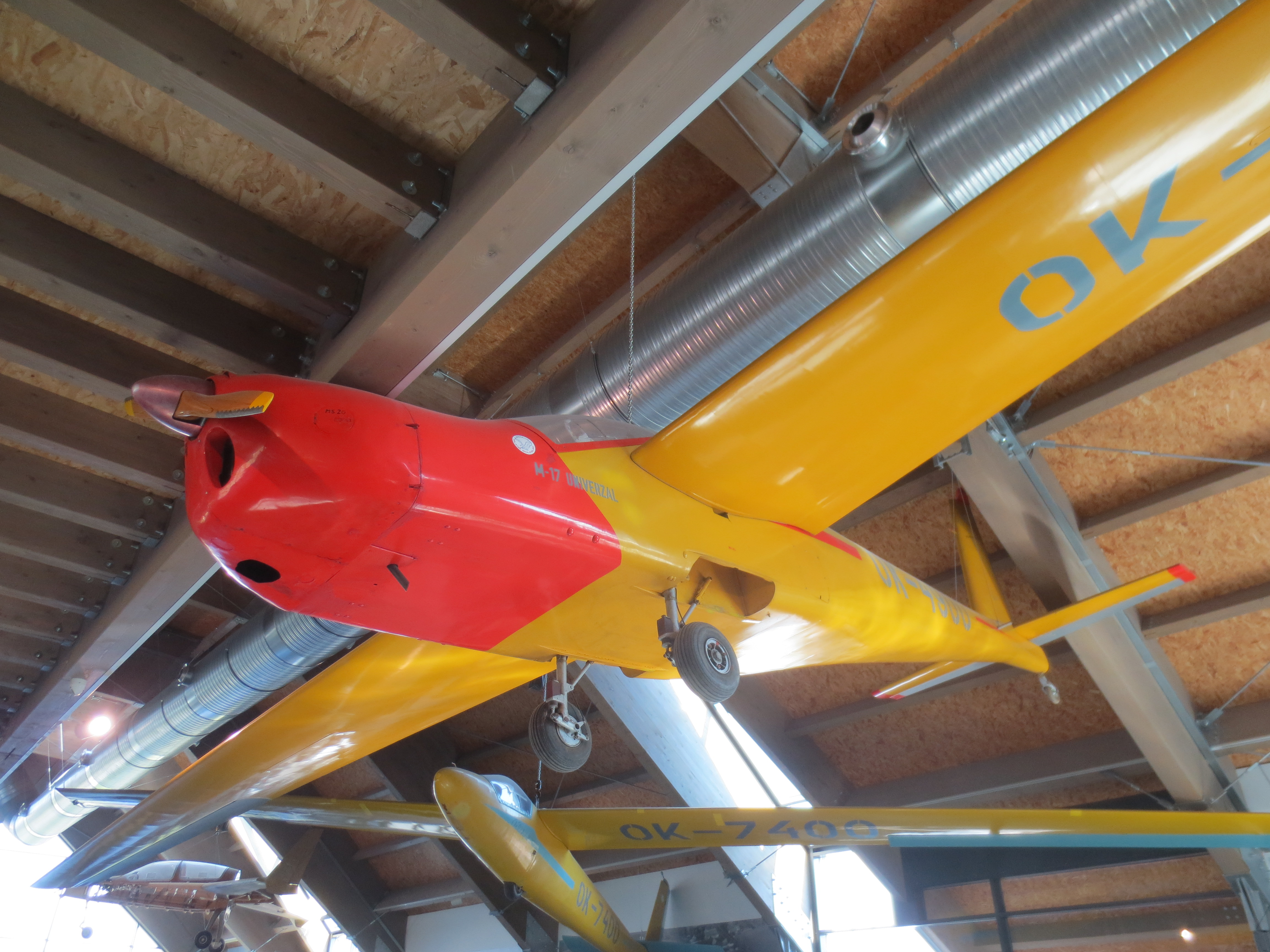 M-17 Universal, Letecké muzeum Metoděje Vlacha, Mladá Boleslav